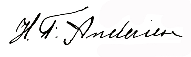 Henk Anderiesen signature.